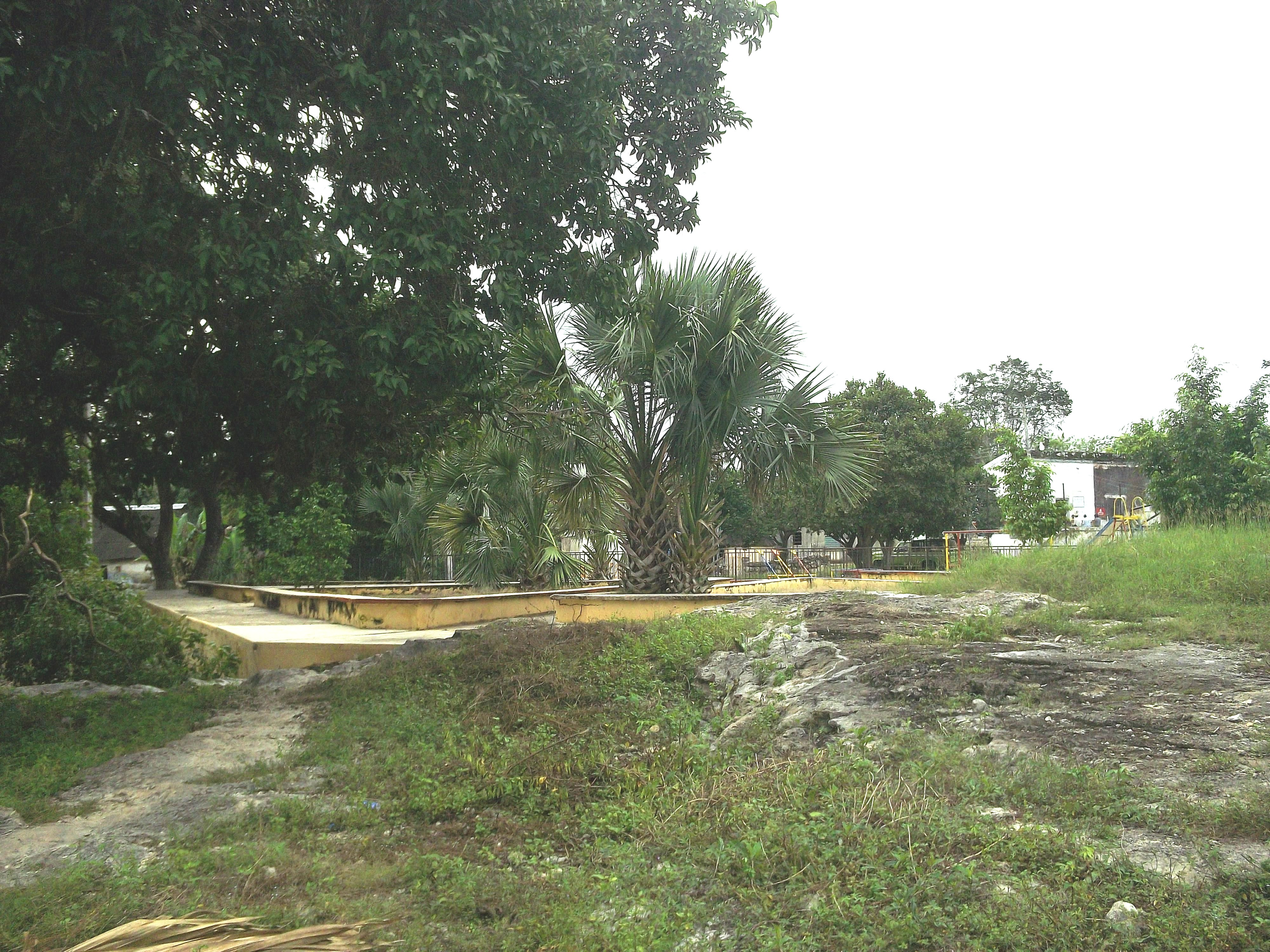 Parque principal de Mucuyché (Abalá), Yucatán.